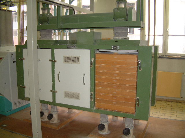 Beschreibung: Plansichter Zeichner: Benutzer:burgkirsch 2004 Quellenangabe und Beleg an burgkirsch(at)web.de erbeten.